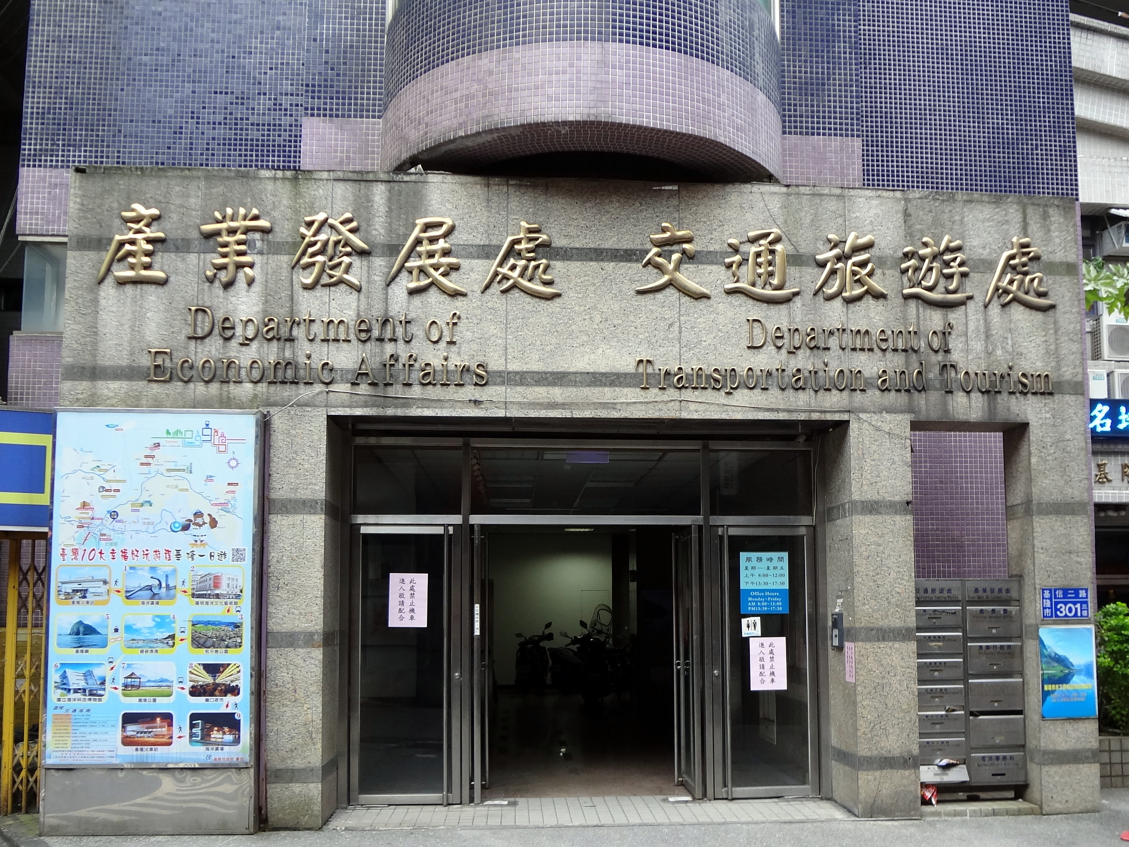 基隆市政府產業發展處與交通旅遊處，位於基隆市信義區信二路301號3樓。